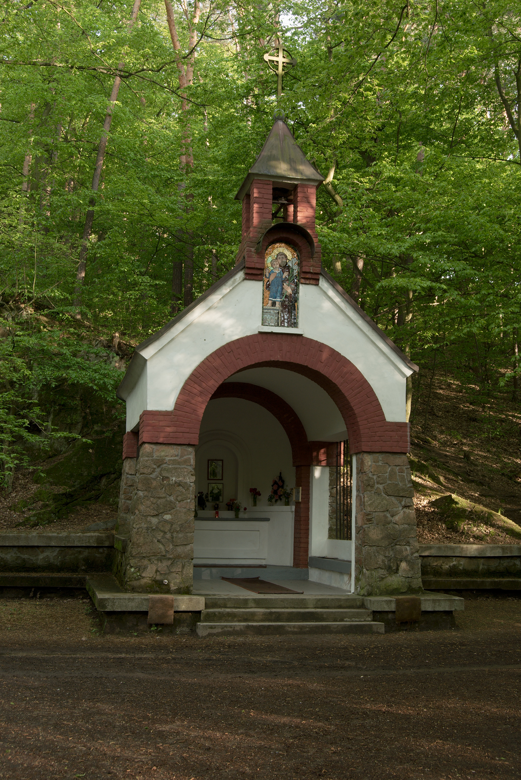 Kaple sv. Antonína na východě brněnského katastrálního území Sadová, městská část Brno-Královo Pole